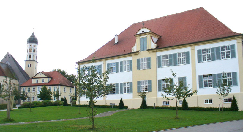 Eberhardzell Landkreis Biberach Baden-Württemberg eigenes Foto vom user:Enslin am 11.9.2005